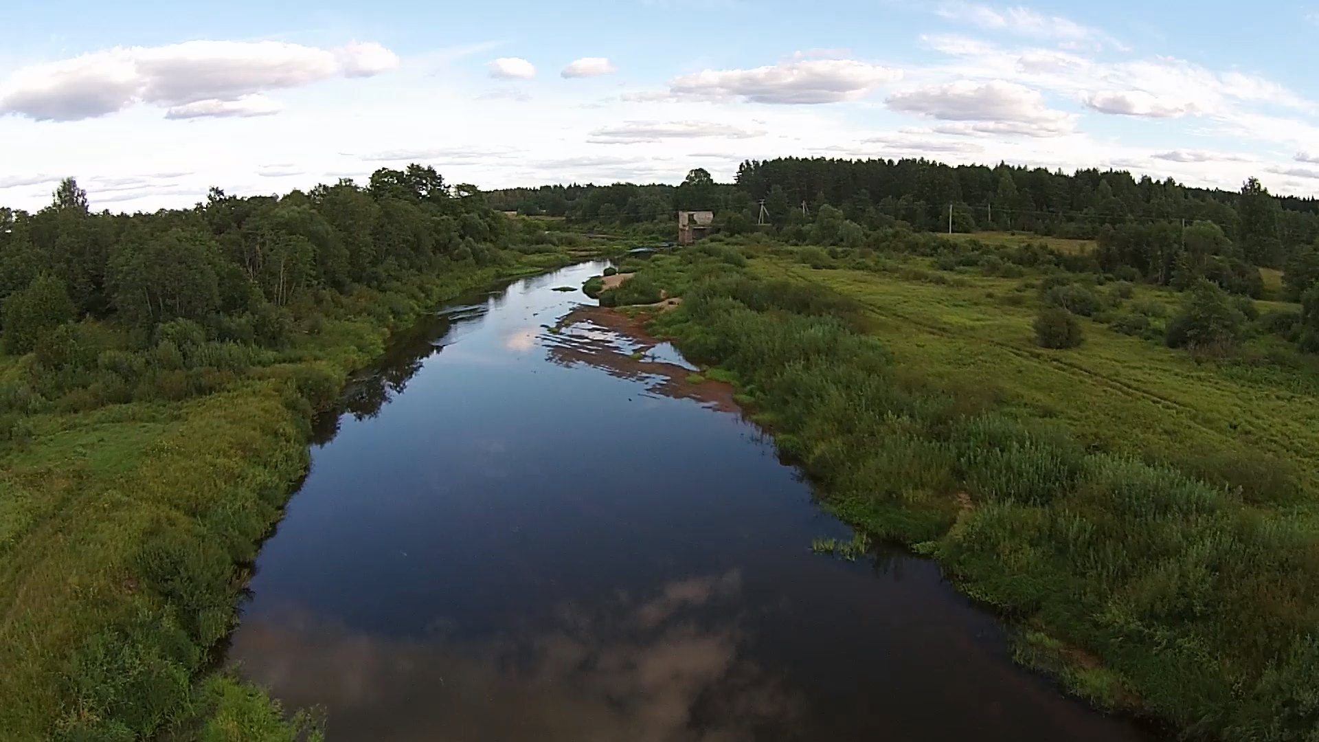 Река Медведица 3 (Тверская область)